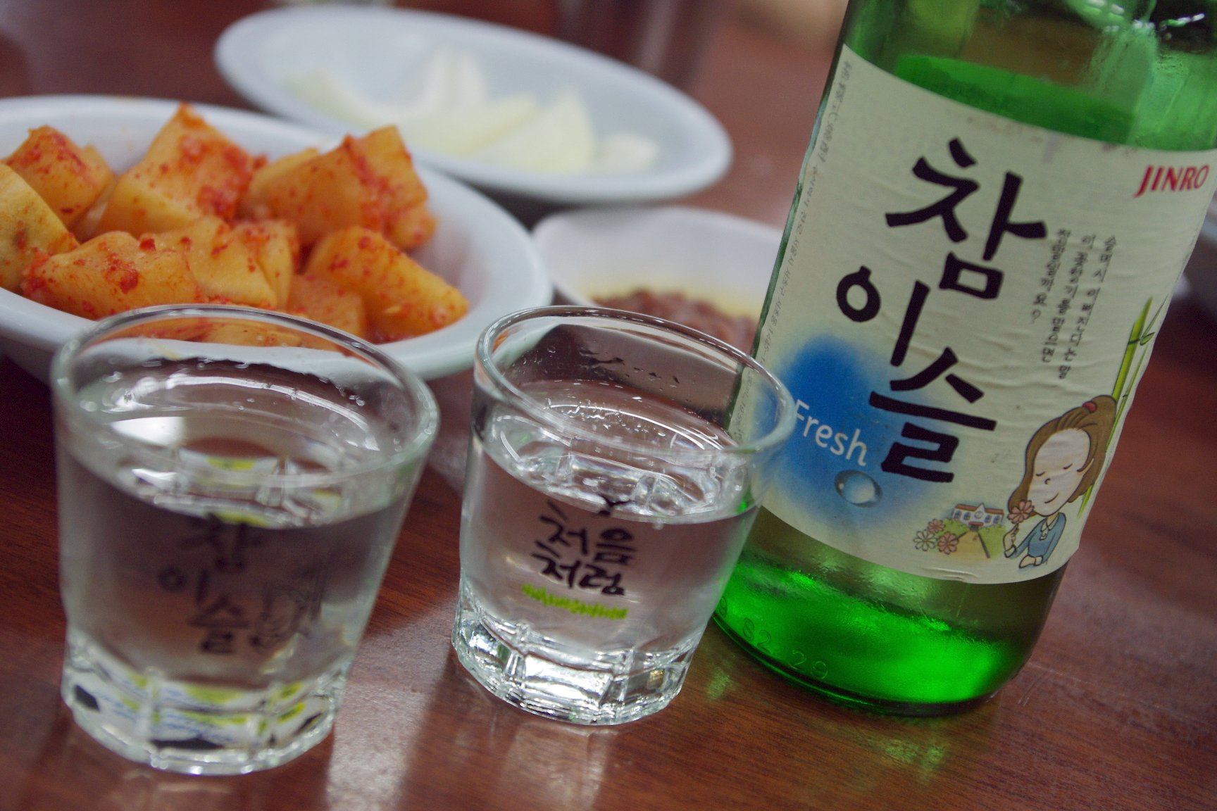 Jinro 진로